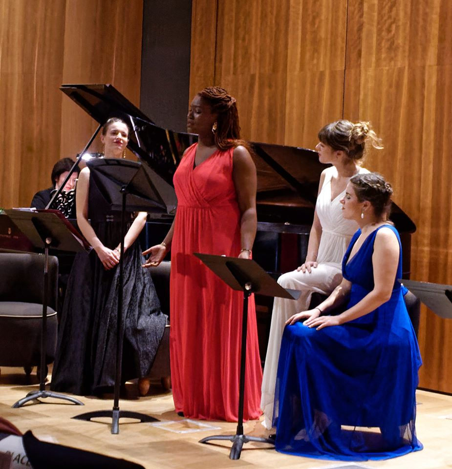 CR - Rondine